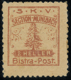 Почтовая марка частной почты в Бистре (Себеш, Румыния)